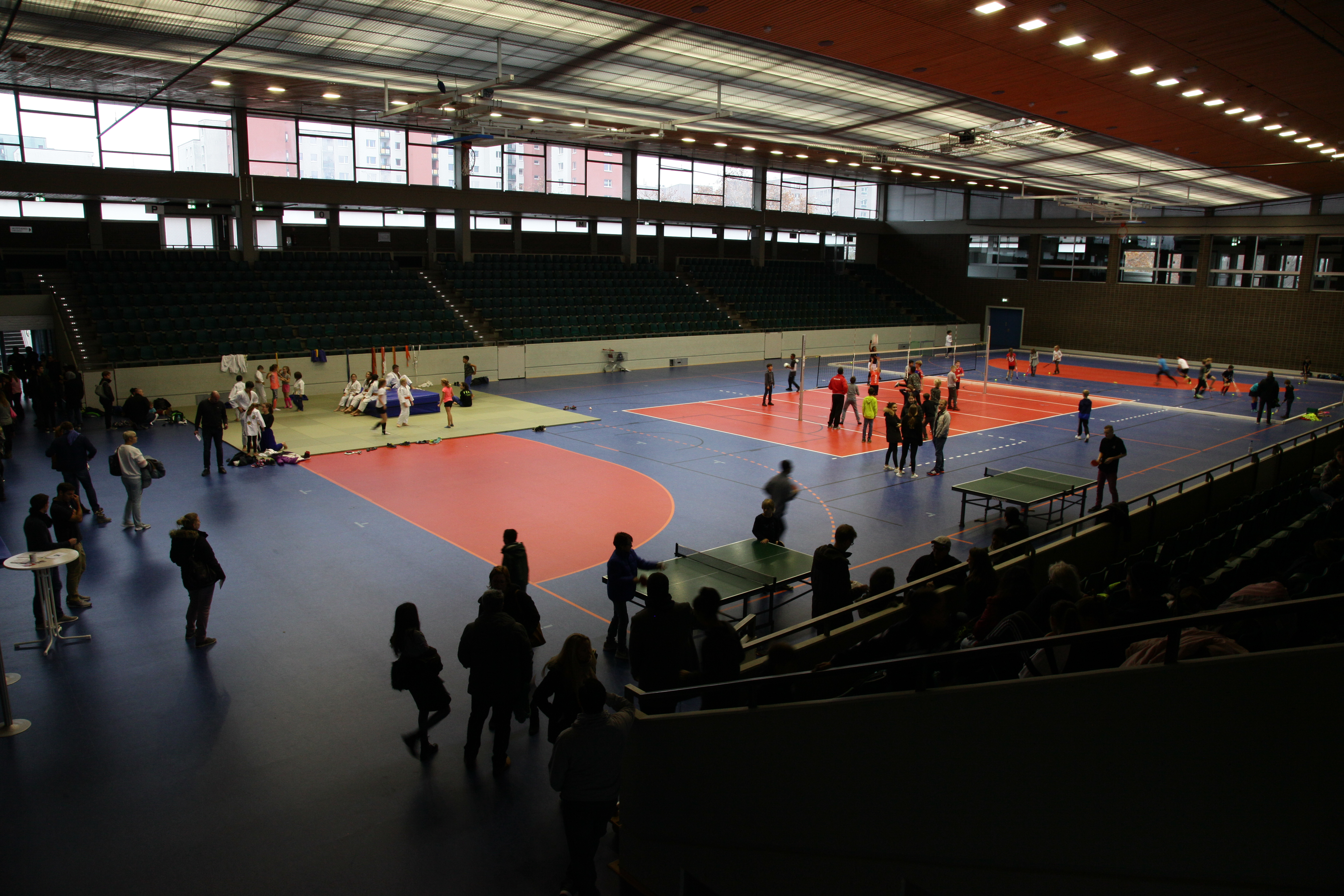 Große Halle in der Großsporthalle in Rüsselsheim am Main während des Tages der offenen Tür 2018 der Immanuel-Kant-Schule